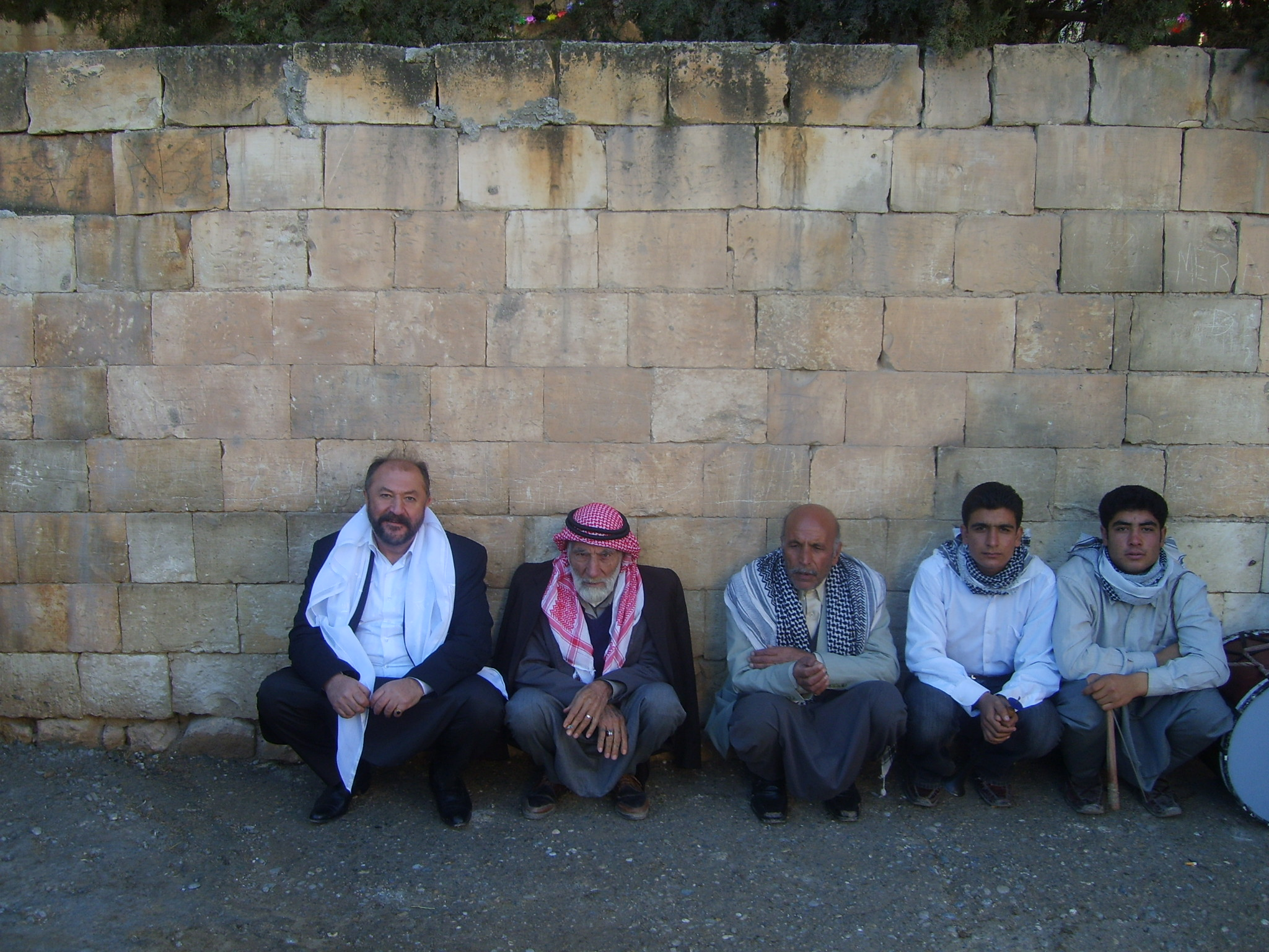 Yaralı Yürek dizisinin çekiminde Urfalılarla birlikte